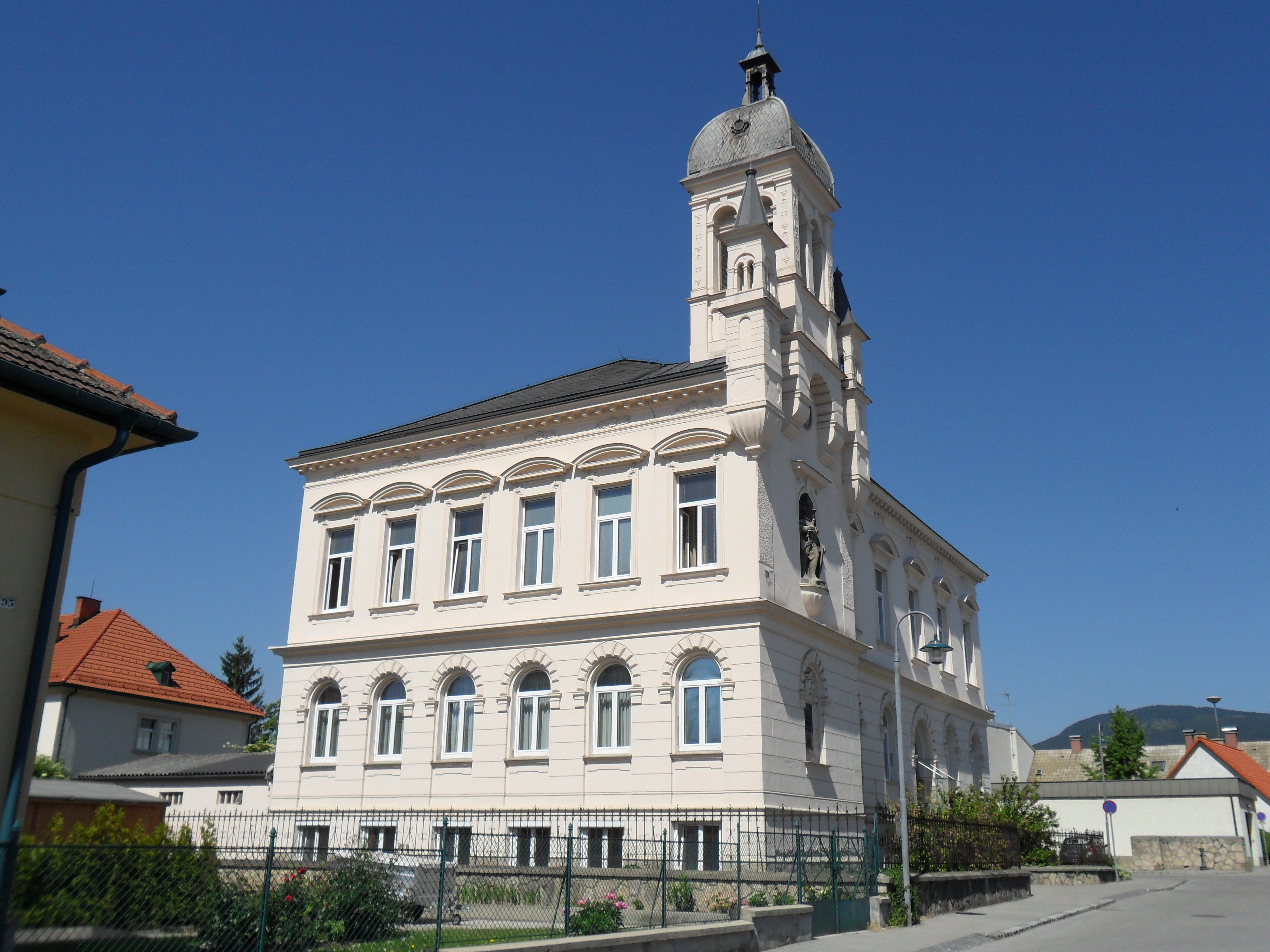 altes Rathaus in Ternitz